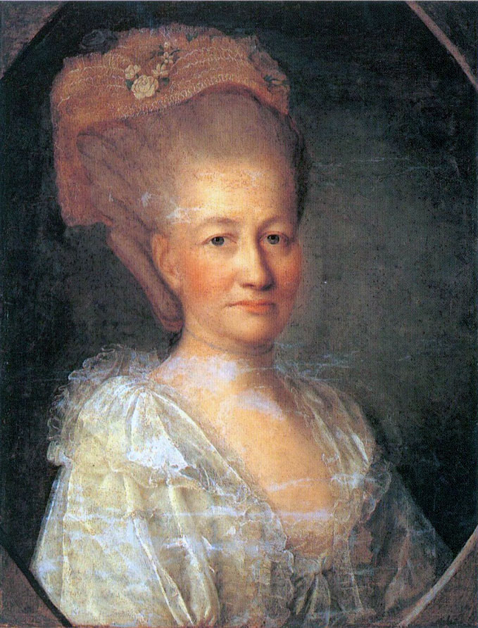 Глебова Дарья Николаевна (1731 – 1790), урождённая Николау, в первом браке Франц, во втором жена А. И. Глебова (его 3-я жена).